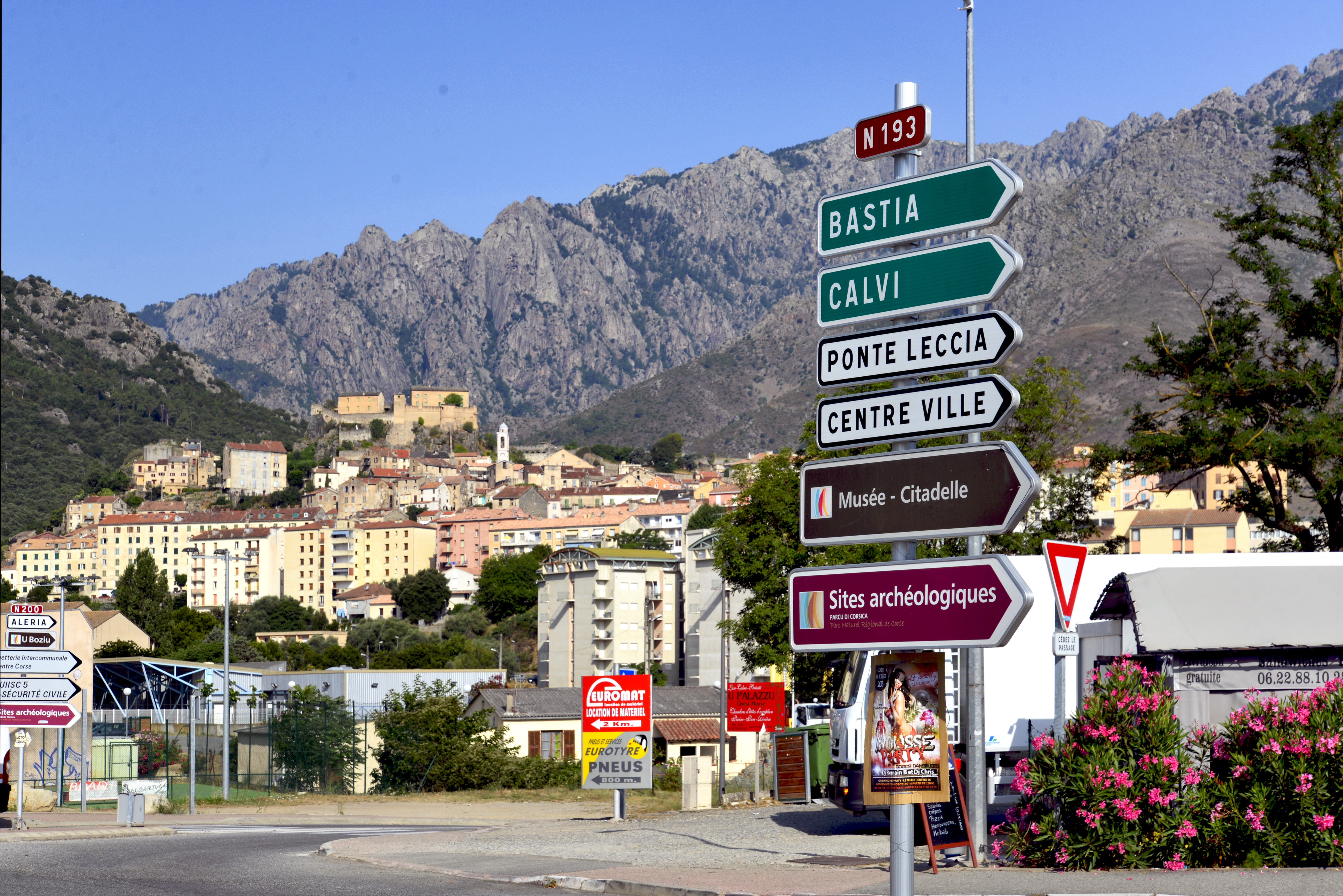 Corte, Centre Corse - La ville vue depuis le rond-point de la gare, jonction des routes nationales 193 et 200.